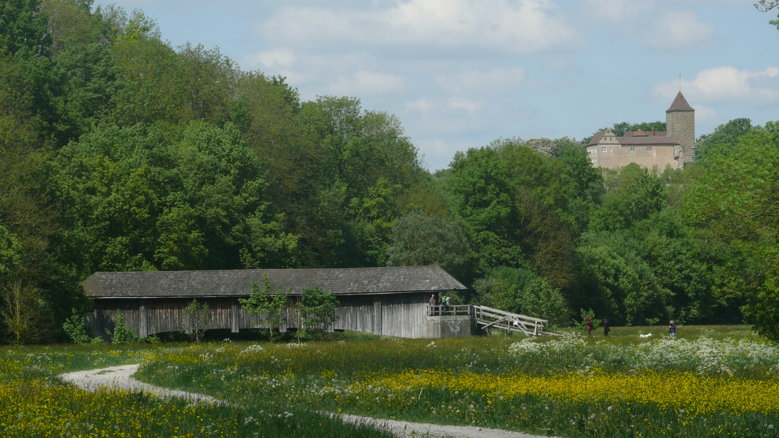 Ockenauer Steg über die Jagst mit der Burg Hornberg im Hintergrund